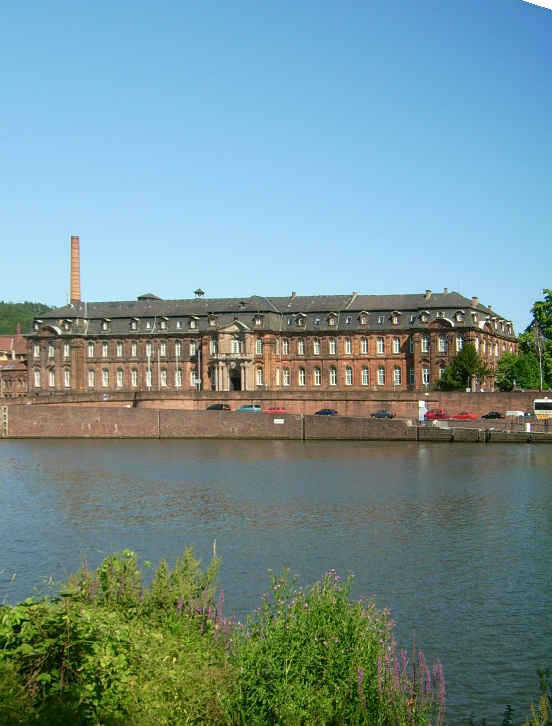 Villeroy & Boch Verwaltungsgebäude